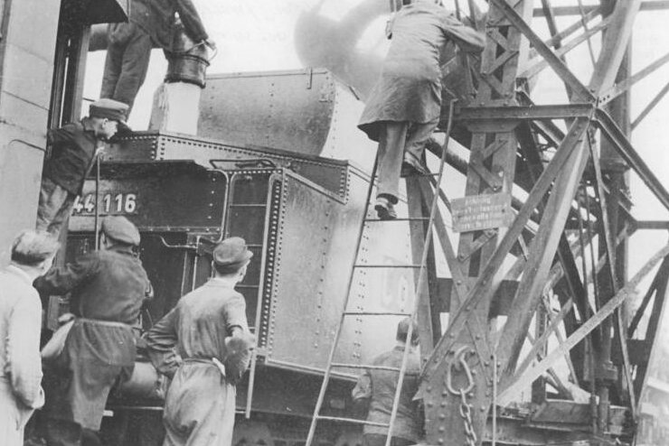 Dampflok 44 116 (BR 44), Betanken Aktivisten der Reichsbahn. Aktivistenlok Nr. 1 von Leipzig-Wahren fuhr am "Tag der Aktivisten" 925 Streckenkilometer in 24 Stunden. UBz: Die Lok beim Wassernehmen auf der Fahrt am 12. Oktober 1949. Aufn. Illus Schulze 4508-49 Nov.1949 4508.11-18